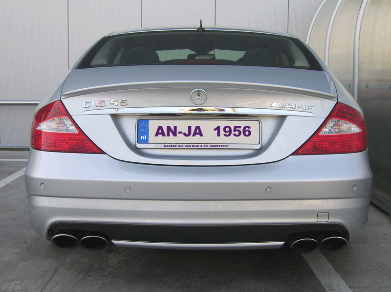 eigen foto, gemaakt in Kroatie in 2005